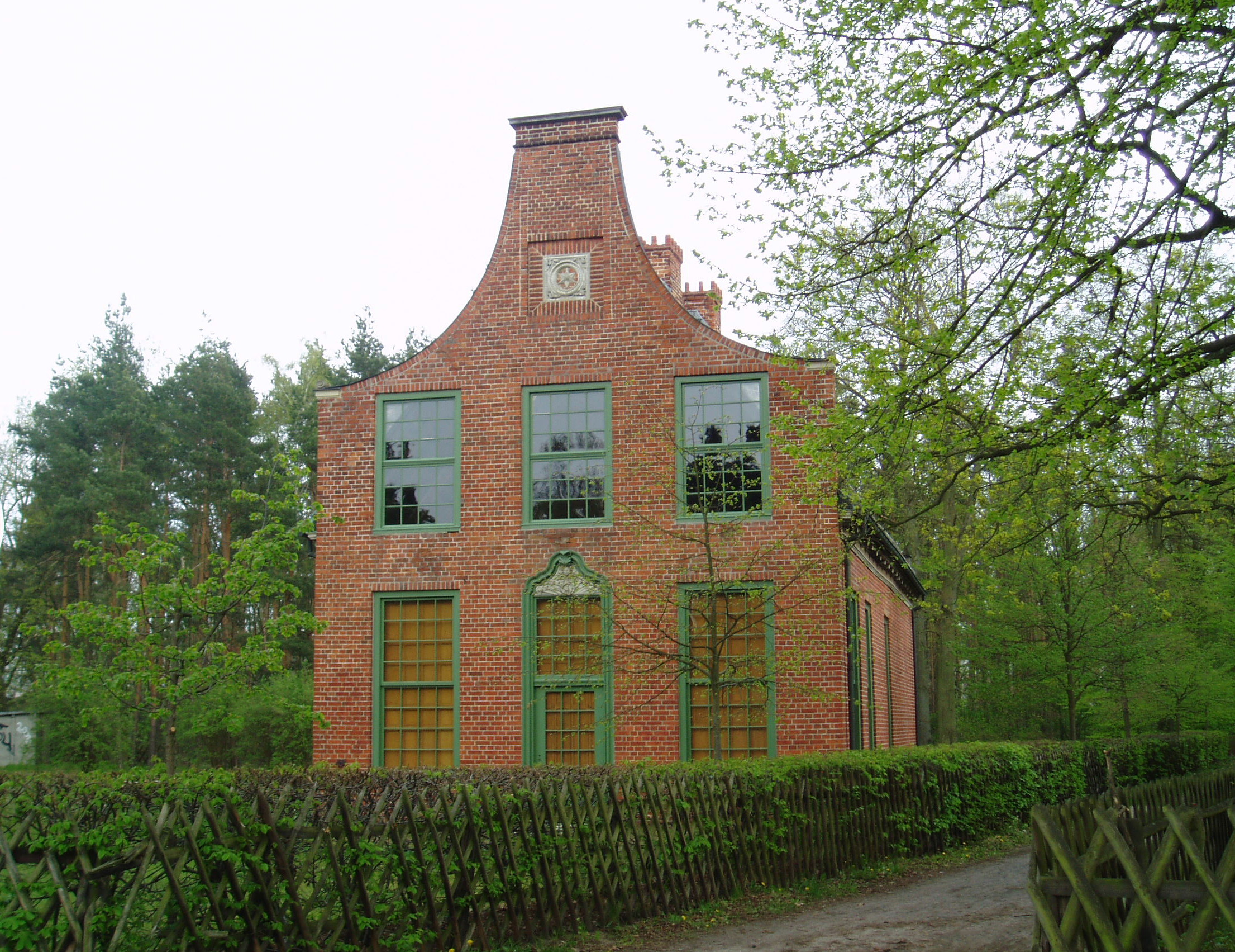 Jagdschloss Stern, am Rand der Parforceheide bei Potsdam, Brandenburg